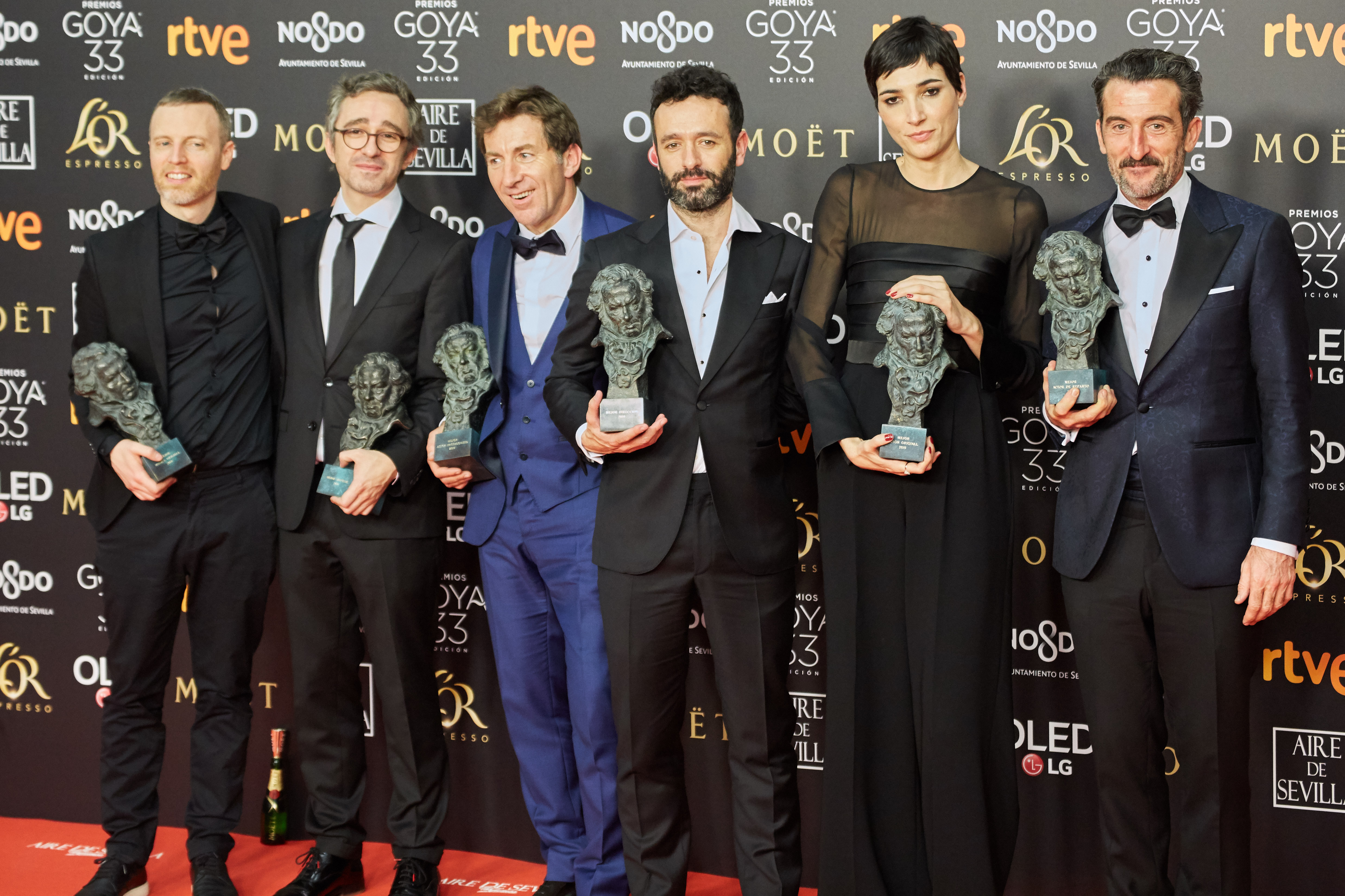 Ganadores de diversos Goya 2019 por El Reino